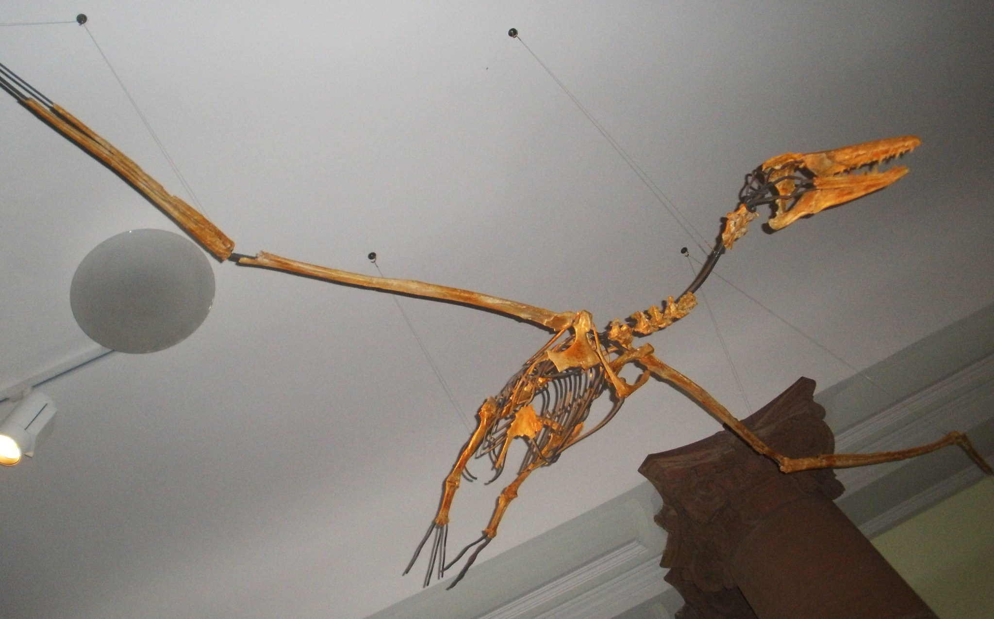 Fossil of Pelagornis, an extinct bird- Took the photo at Senckenberg Museum of Frankfurt